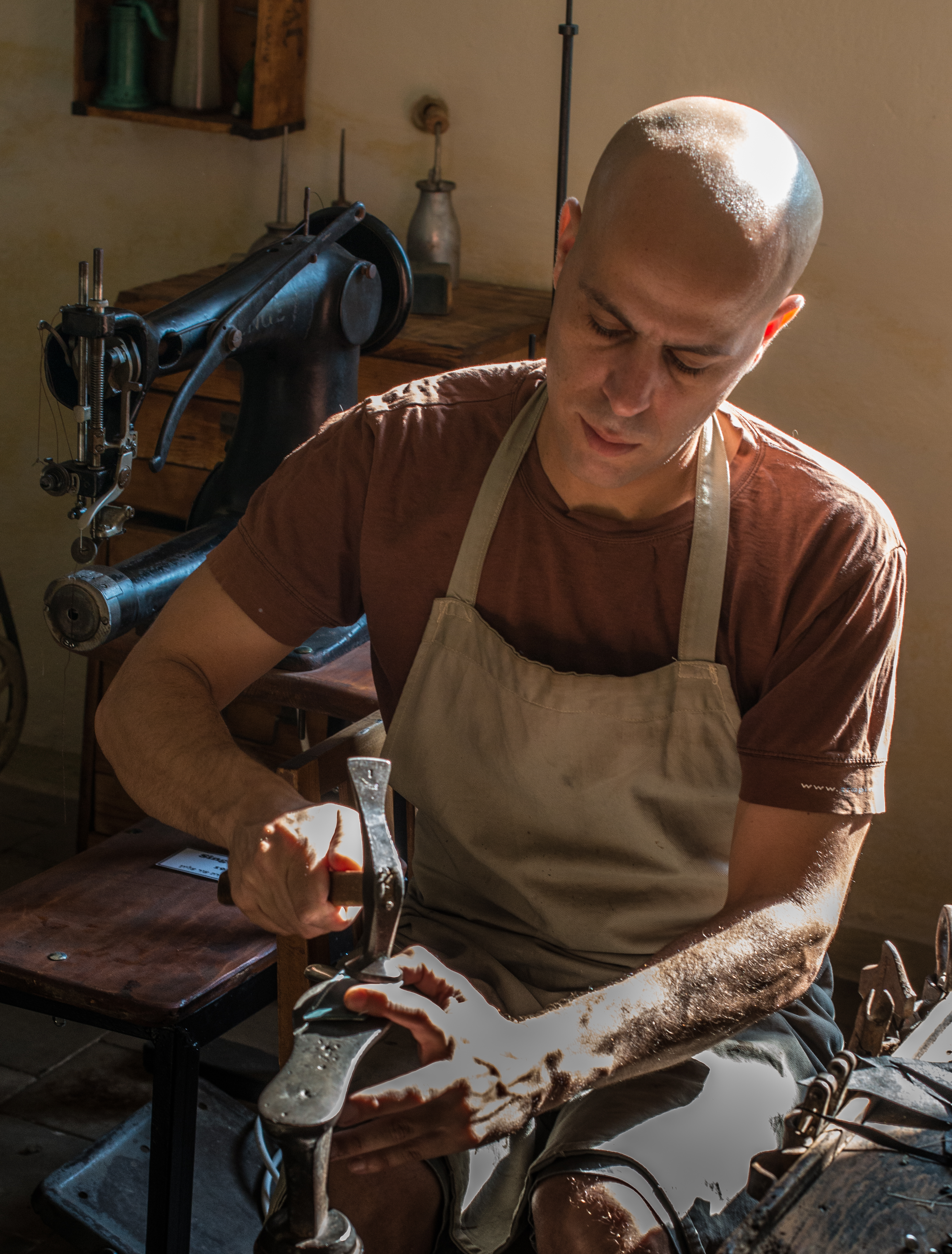 הסנדלריה כפי שנשתמרה משנת 1932 ועד היום עם כל הציוד המקורי